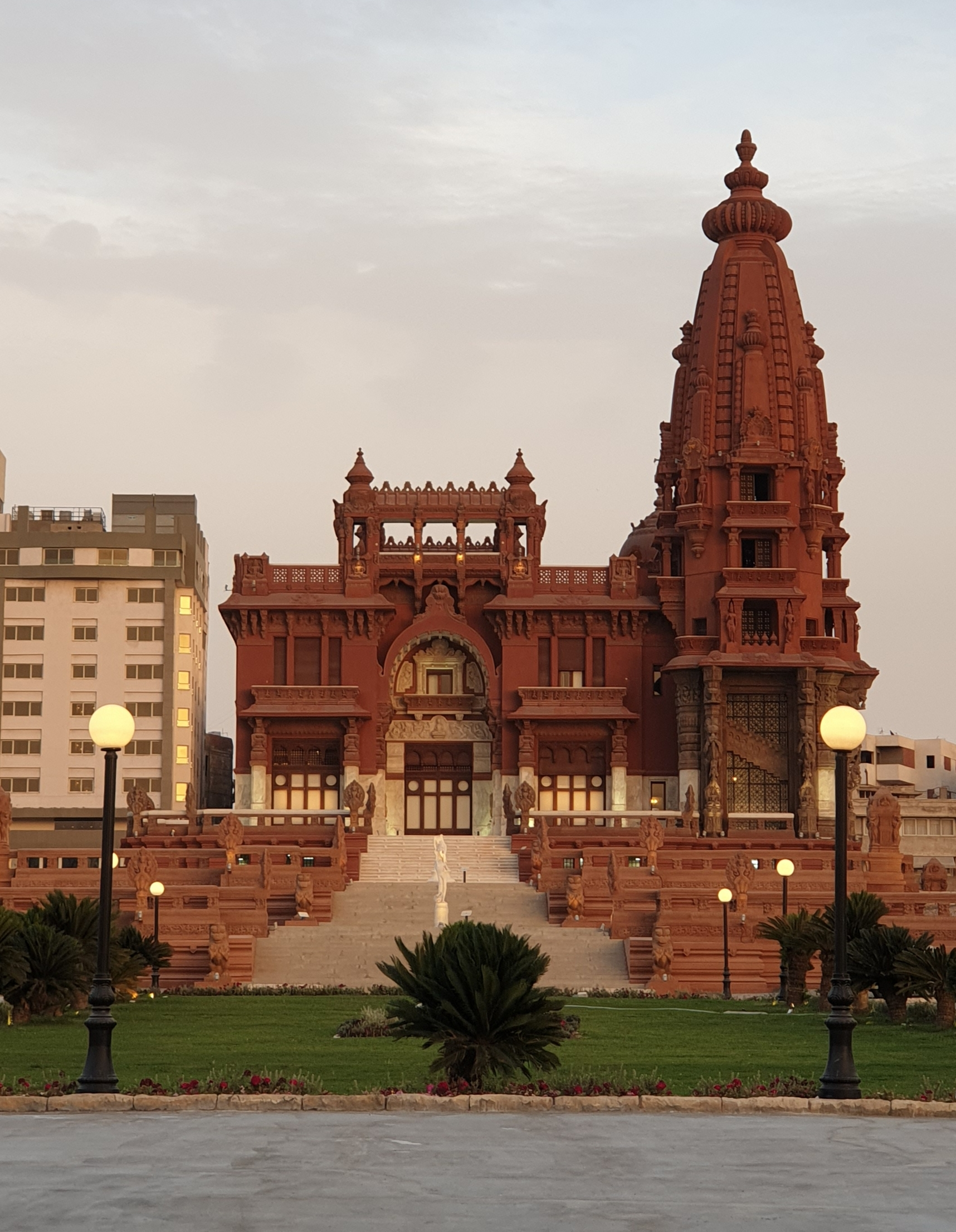 قصر البارون إمبان